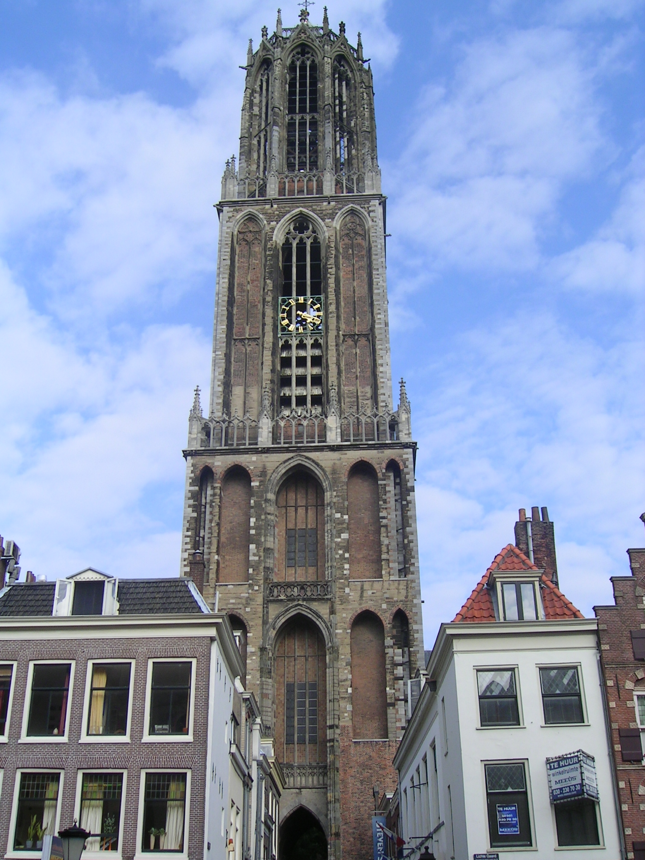 Turm des Doms in Utrecht.